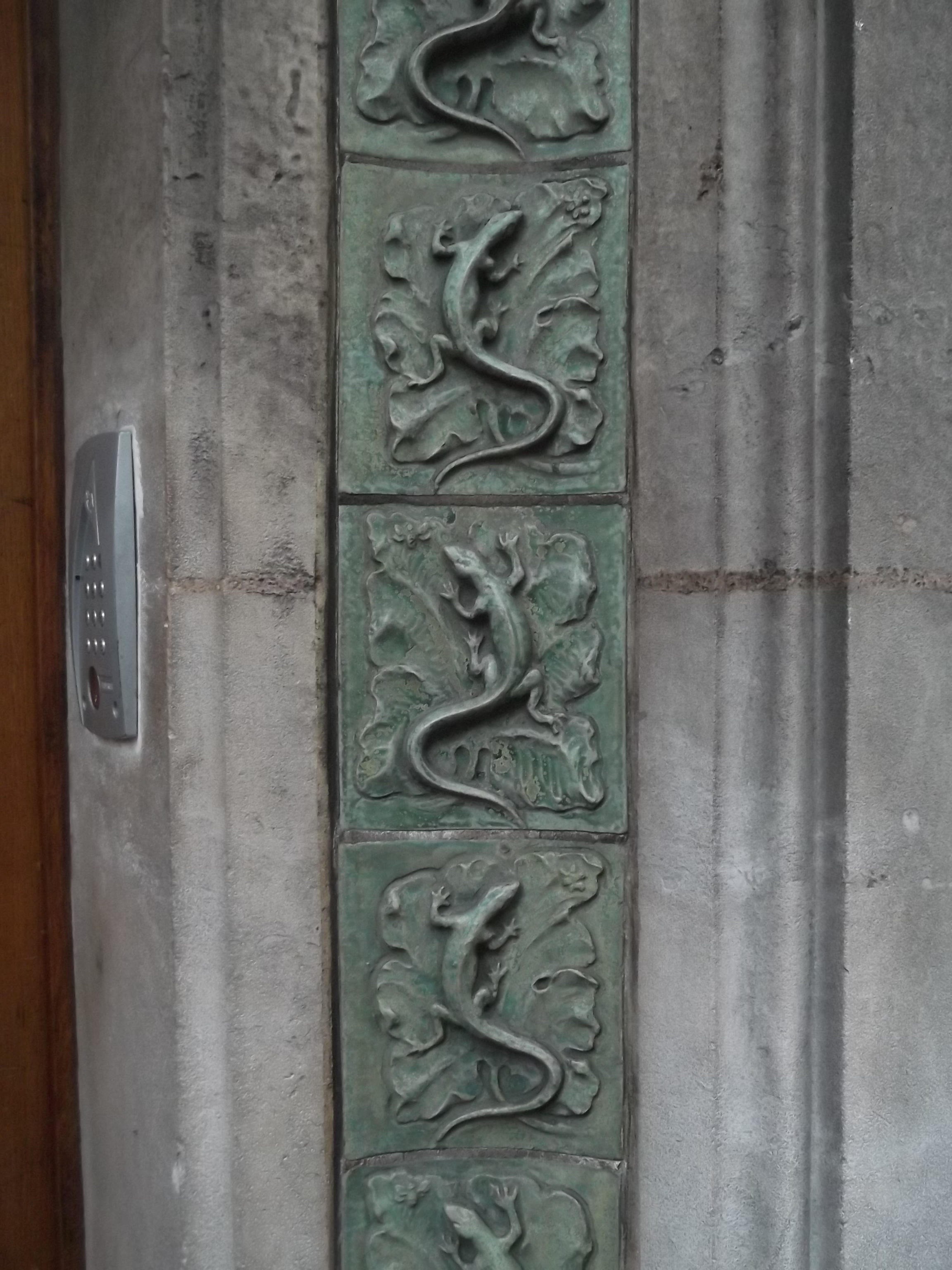 Le 76 rue Mademoiselle à Paris. Le porte d’entrée présente des animaux sur le contour. En encadrement une série de petits lézards et en haut un chat et un chien regardent les personnes entrant dans le bâtiment.